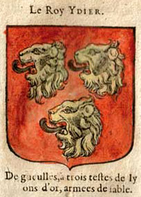 Lr roi Ydier